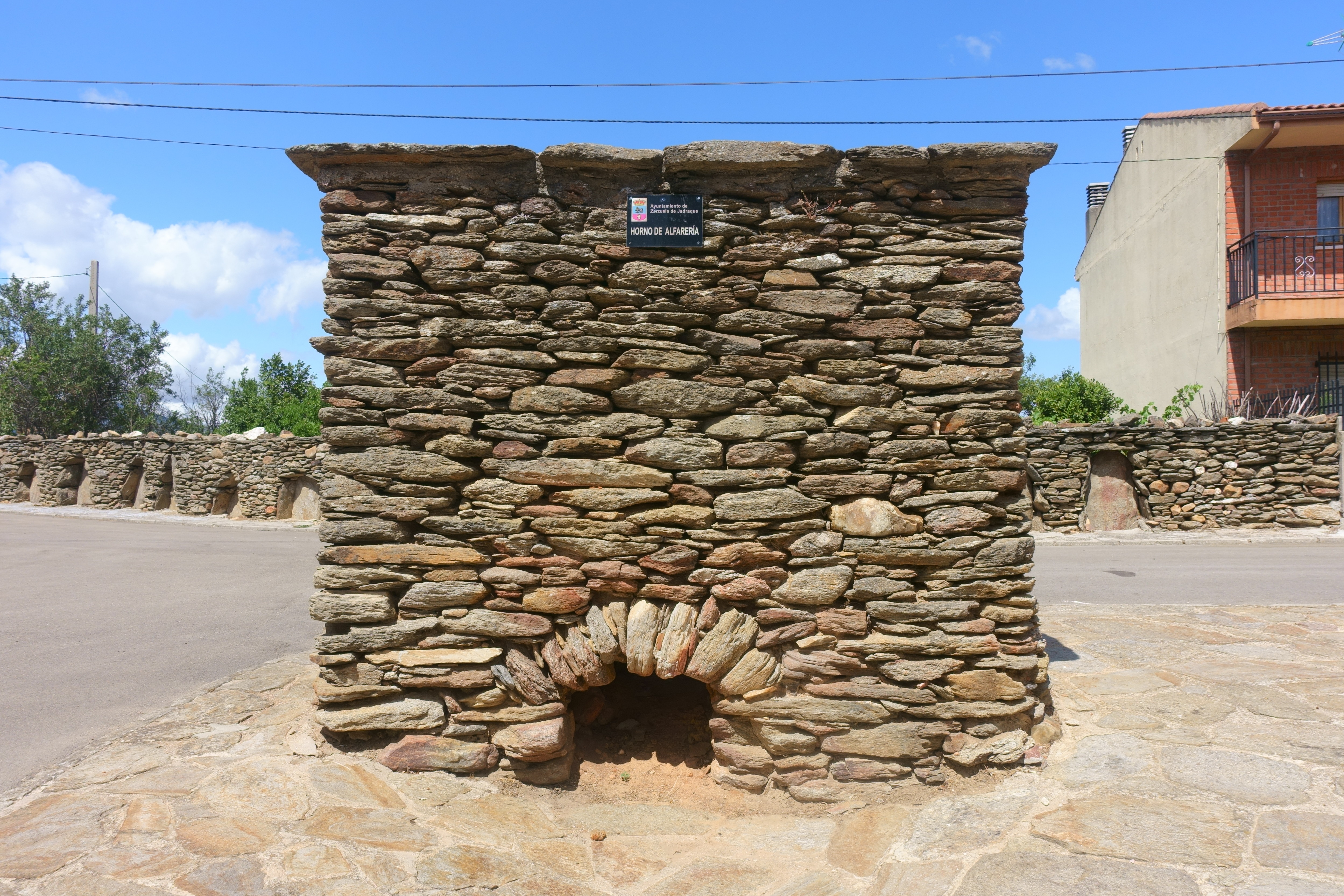 Antiguo horno alfarero en Zarzuela de Jadraque (Guadalajara, España).